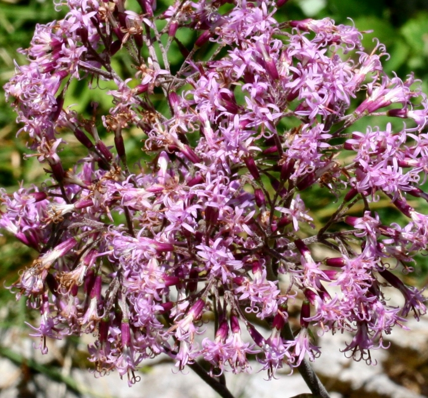 Adenostyles glabra